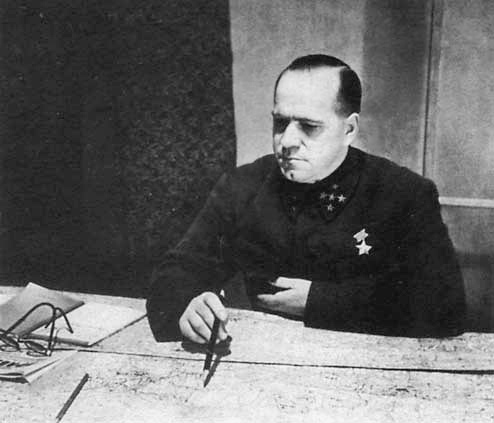 Marshal Georgi Zhukov in October, 1941. Маршал Жуков в октябре 1941. Фото опубликовано в газете «Красная звезда» по личному указанию Сталина.